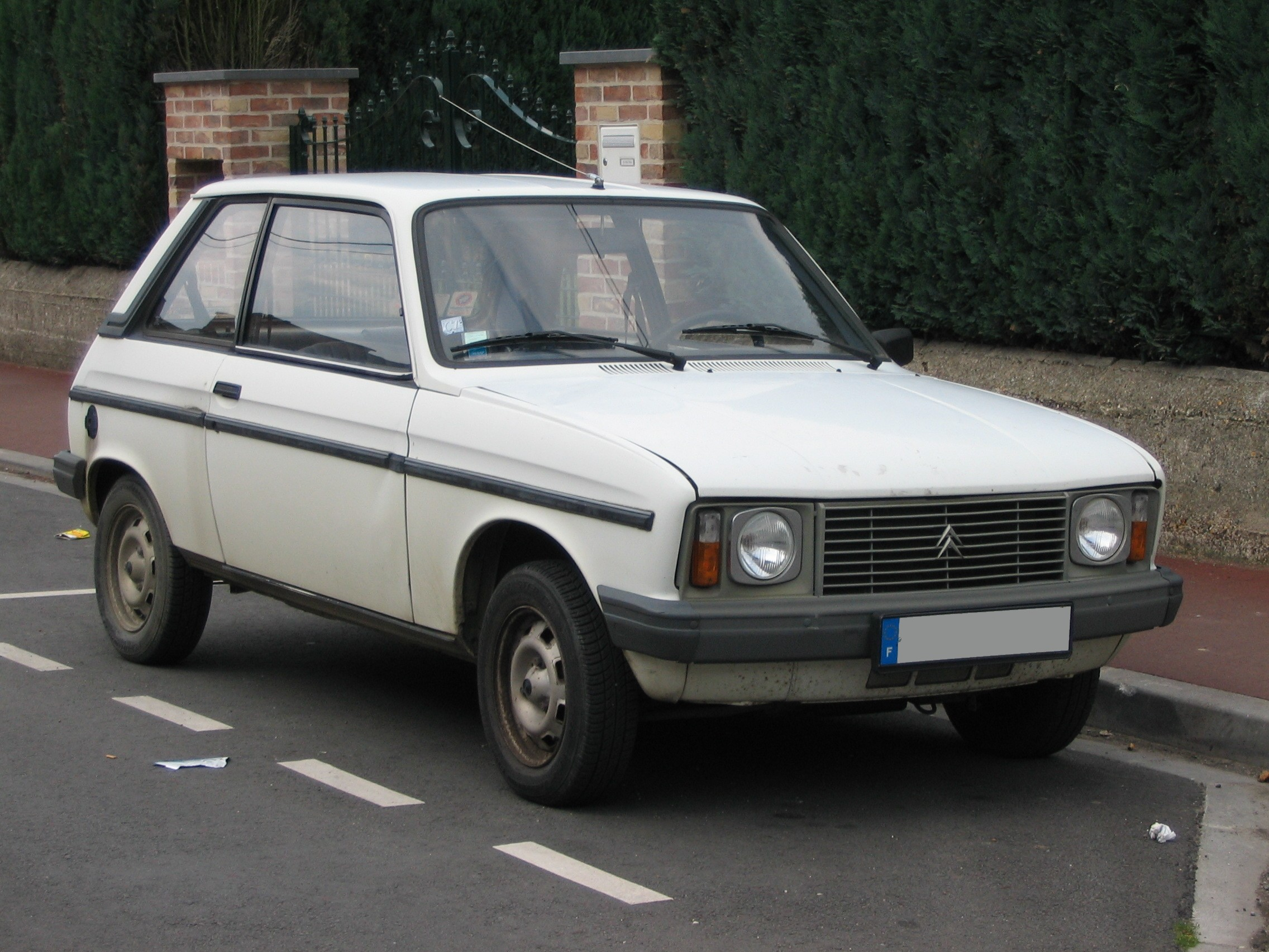 Le mini-coupé Citroën LN/LNA, produit durant une décennie (1976-86), dérive étroitement de la Peugeot 104 (1972-88). Il est aussi apparenté à la Talbot Samba (1981-86).